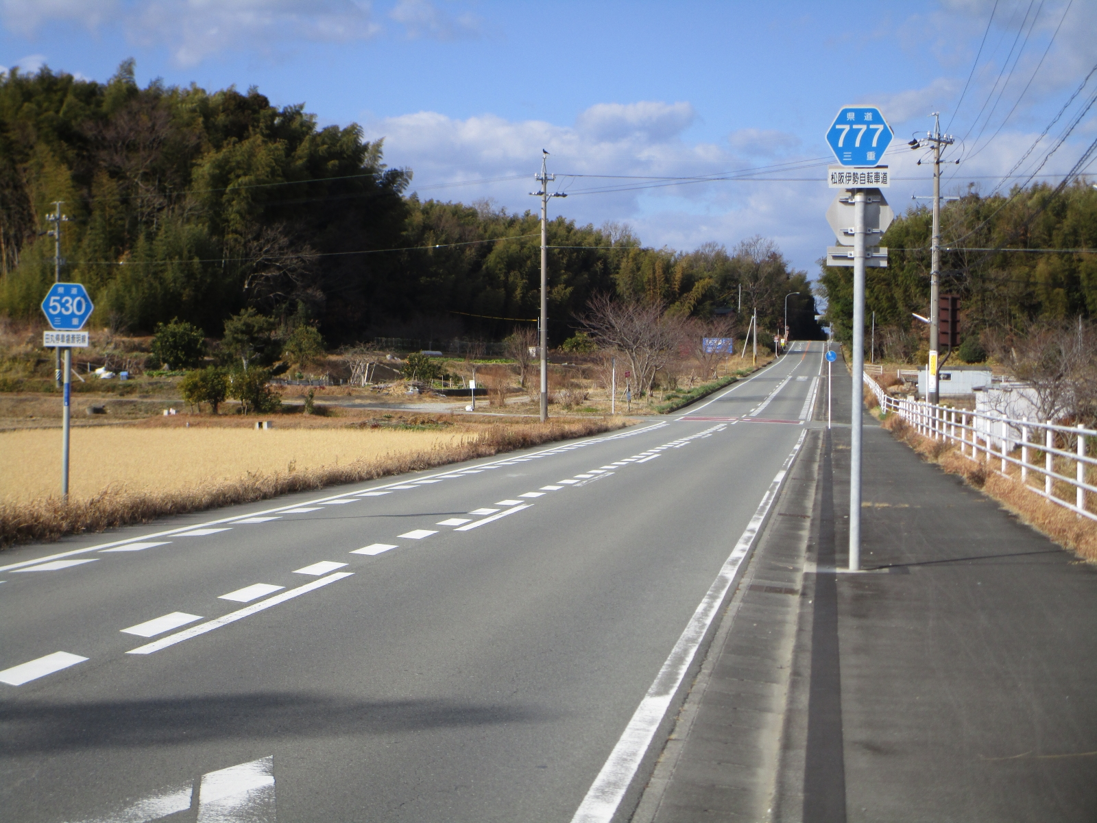 三重県道530号田丸停車場斎明線および777号松阪伊勢自転車道線（サニーロード、三重県度会郡玉城町、伊勢カントリークラブ付近より撮影）